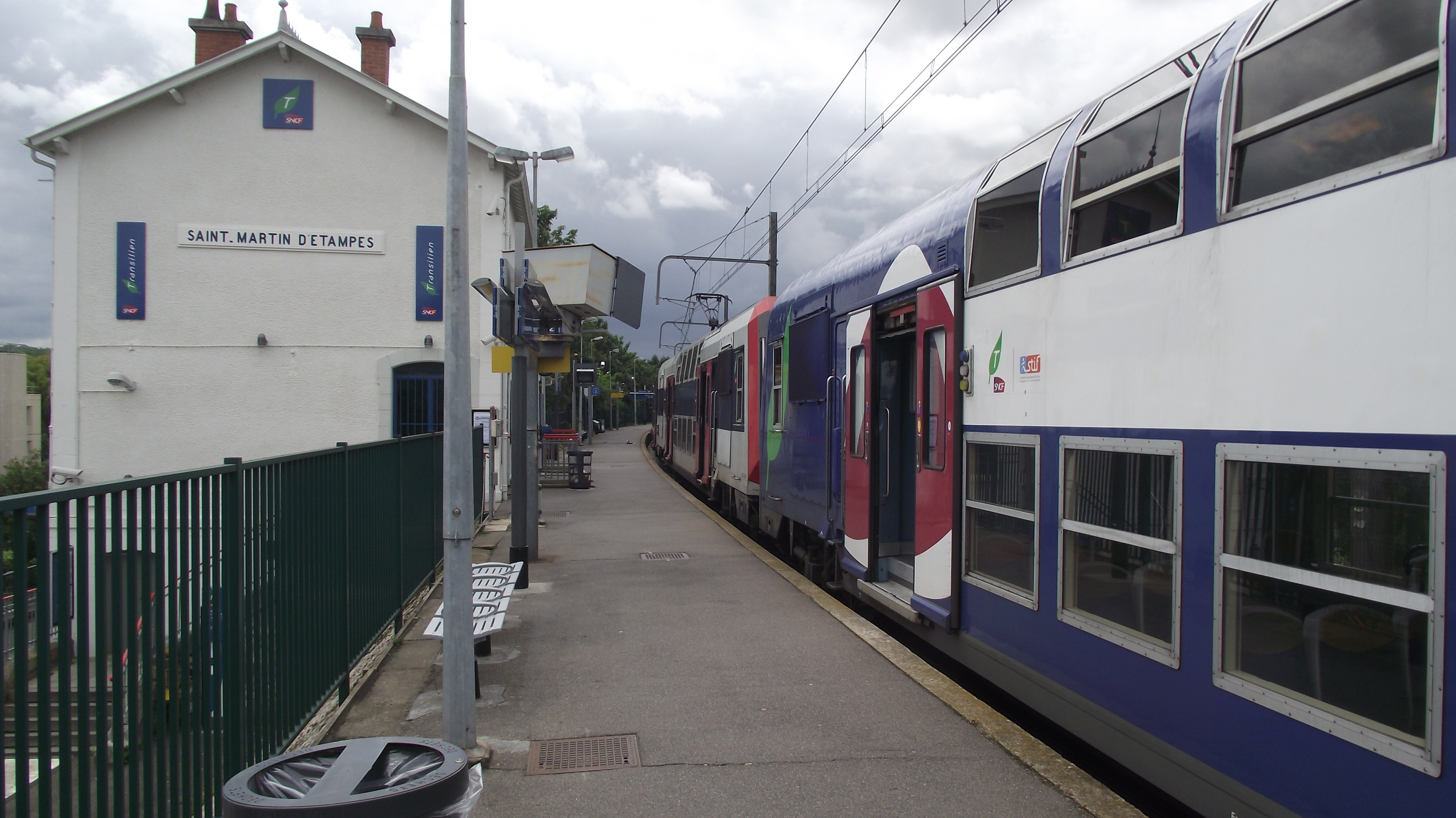 RER C trein in het Saint-Martin-d'Étampes station.